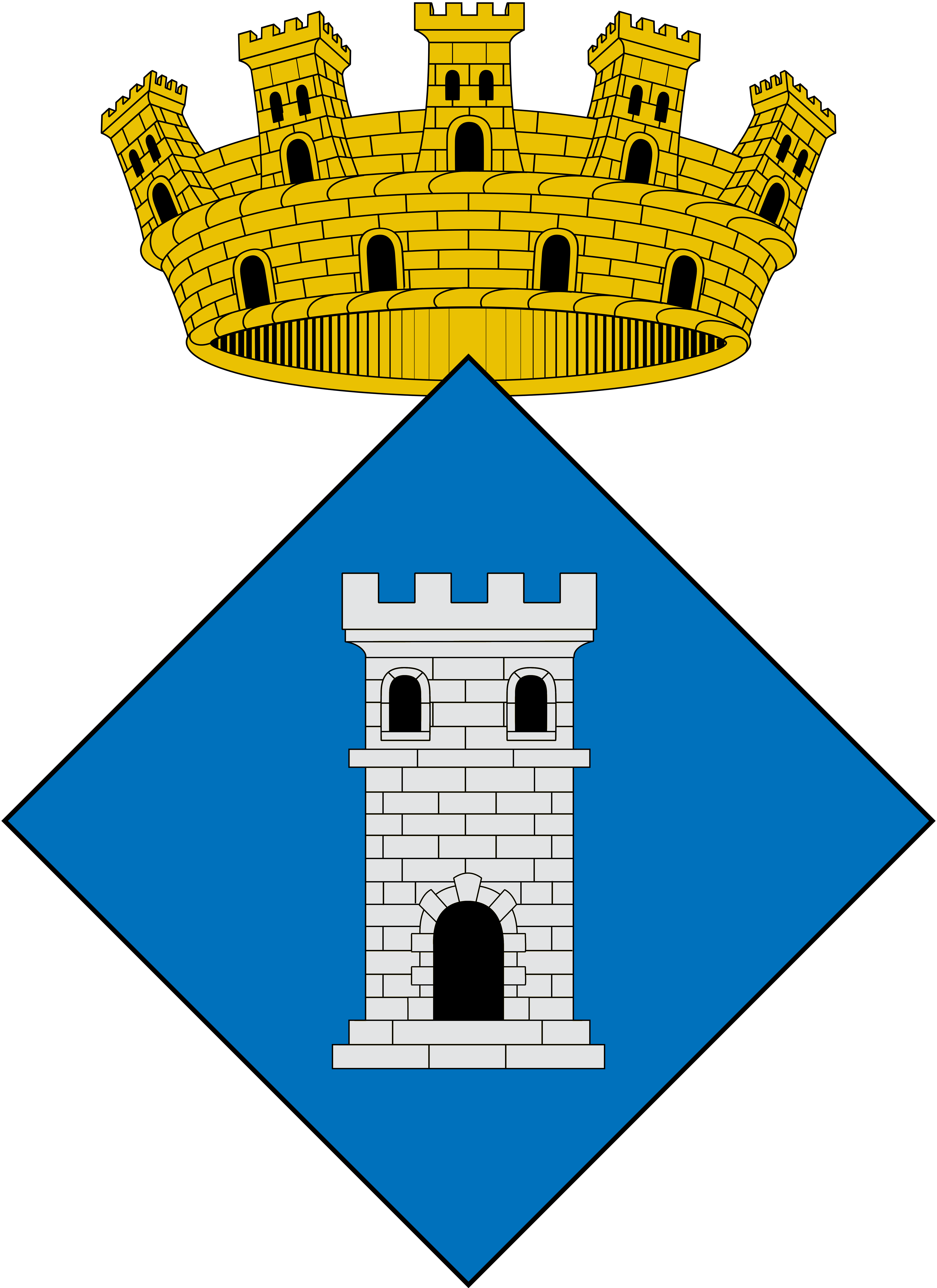 Escudo de Castellolí, Barcelona